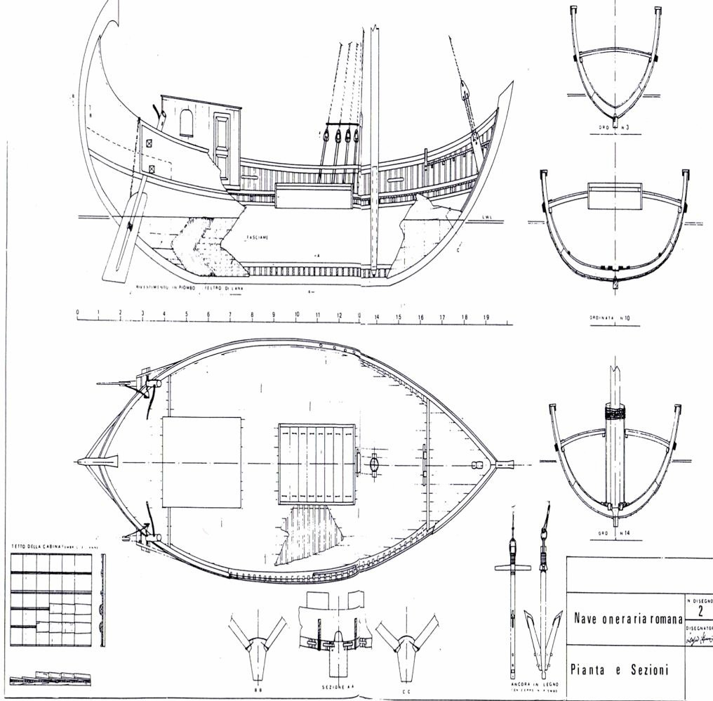 Sección y planta de una nave Onerarai donde vemos el fondo redondeado y la diferencia de altura entre la proa y la popa